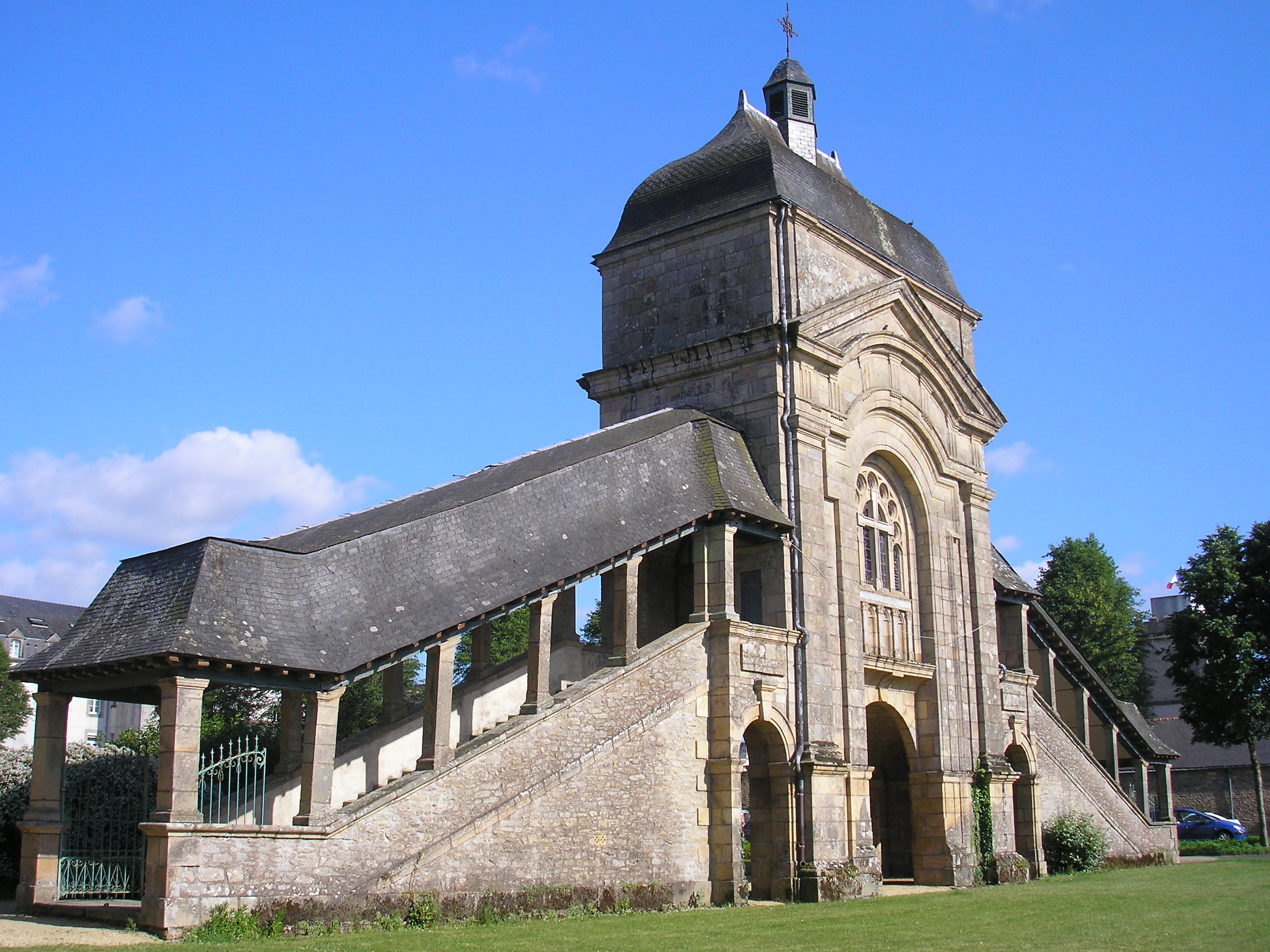 Sainte-Anne-d'Auray (Bretagne, France). La Scala Sancta.